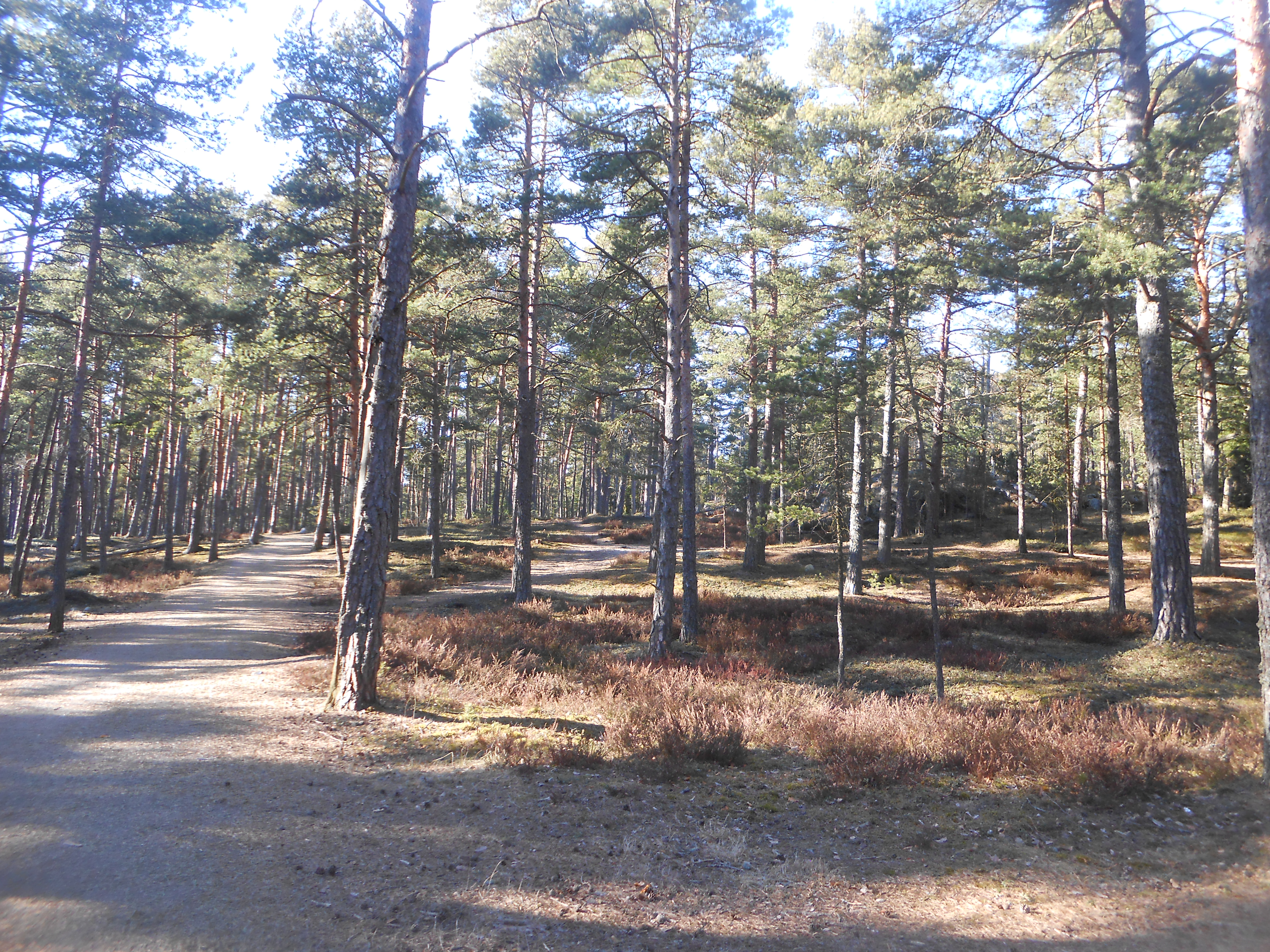 Kallahdenniemen harjuluontoa keväällä